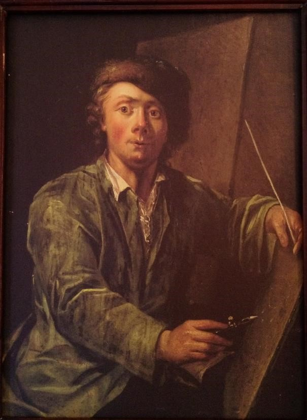 zelfportret van de schilder, anno 1770. Gecomprimeerde foto van een kopie van het origineel.